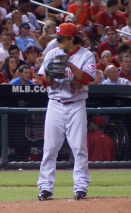 Daniel Ray Herrera